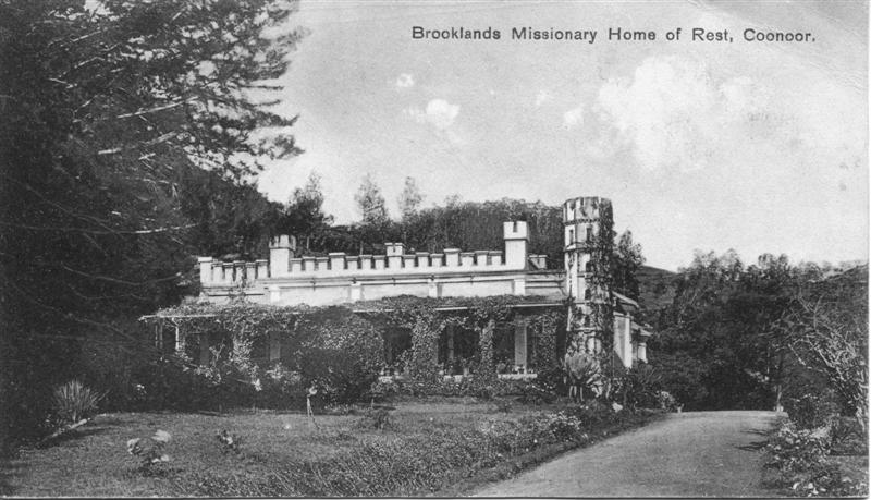 Brooklands, Coonoor India